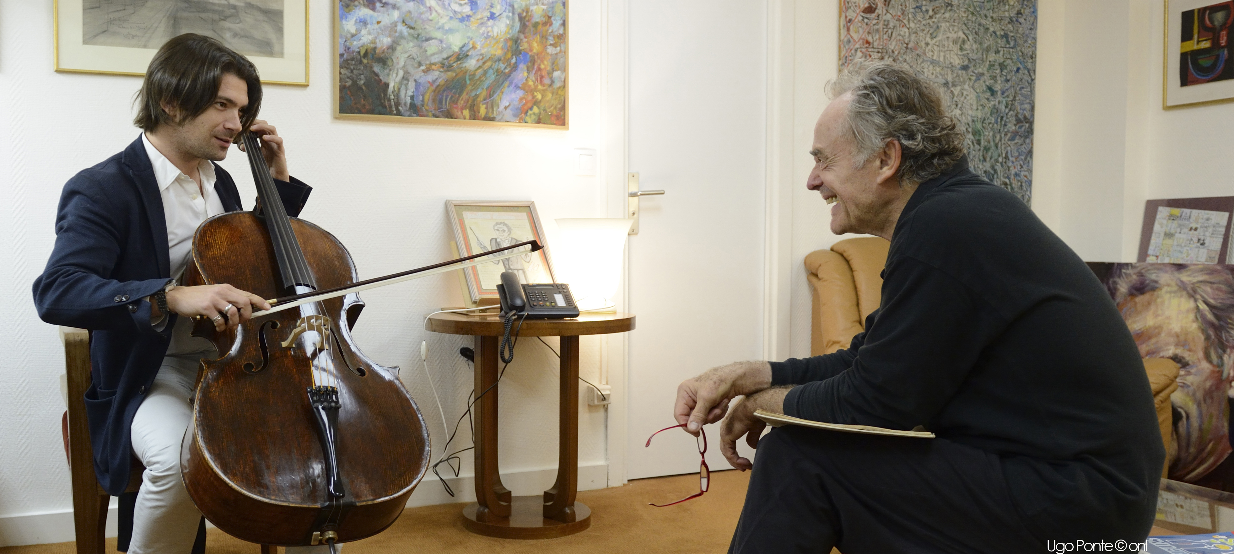 Echanges dans la loge avant le concert, entre le soliste et le maestro